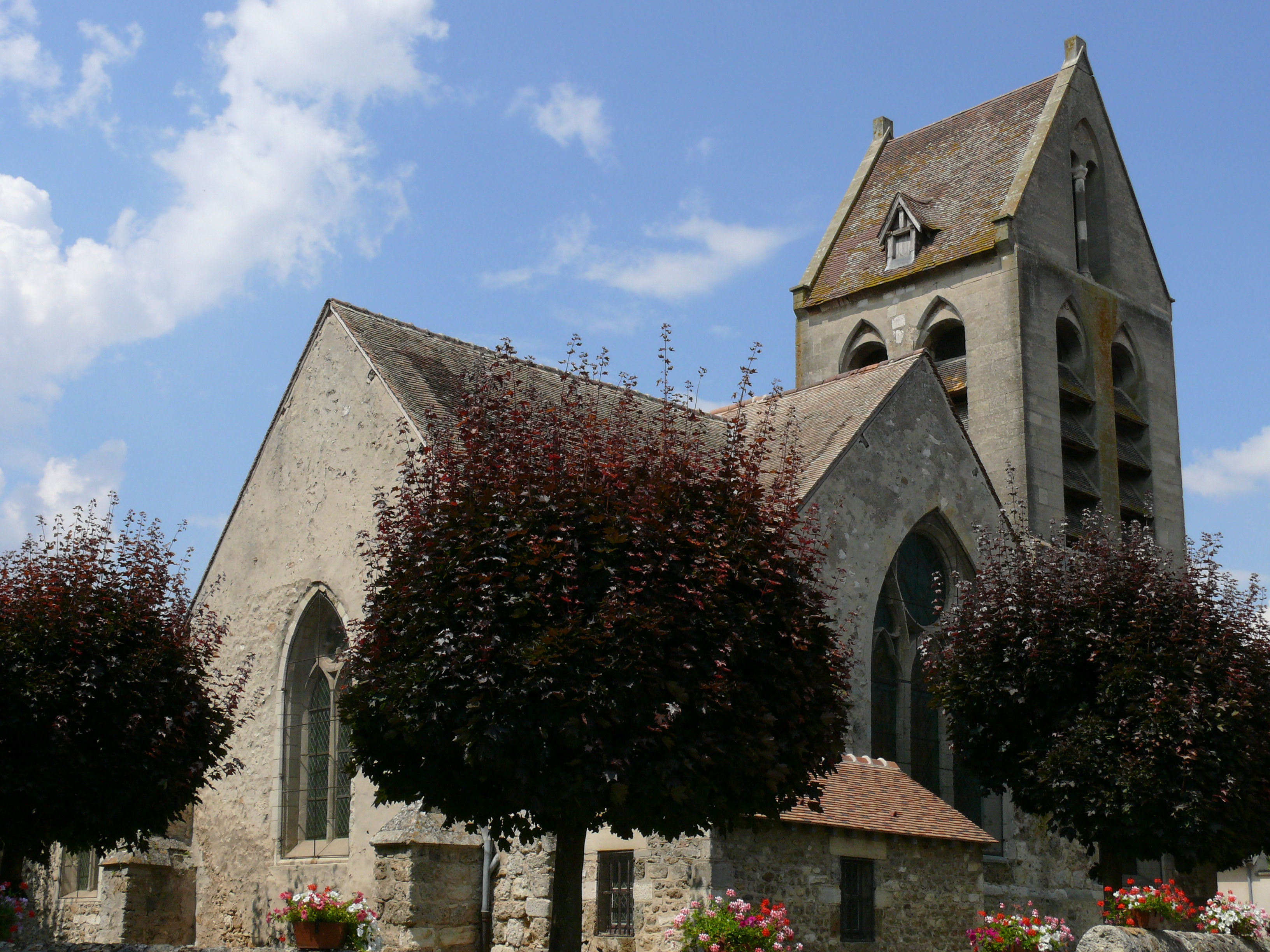 Reuil - Eglise Saint-Martin